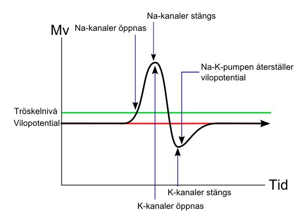 Bild föreställandes en cells aktionspotential under depolarisering och repolarisering.